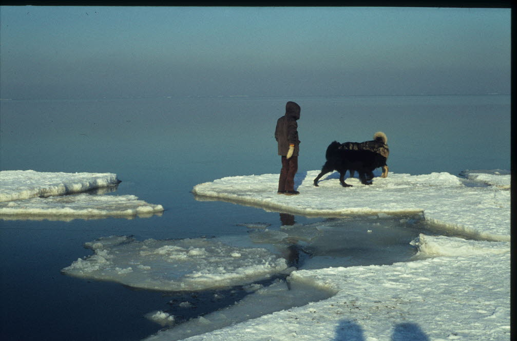 Schönberger Strand im Winter mit Eisschollen.